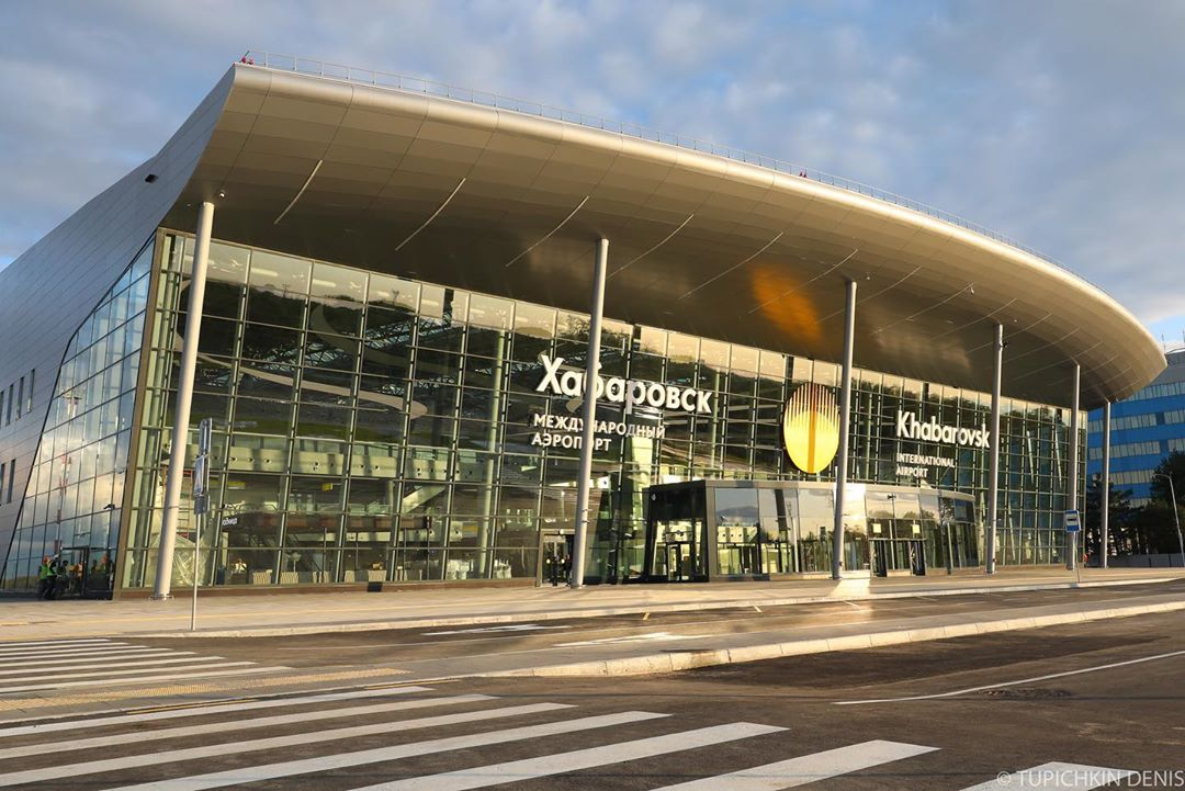 Новый внутренний терминал, открытый 14 октября 2019 года.